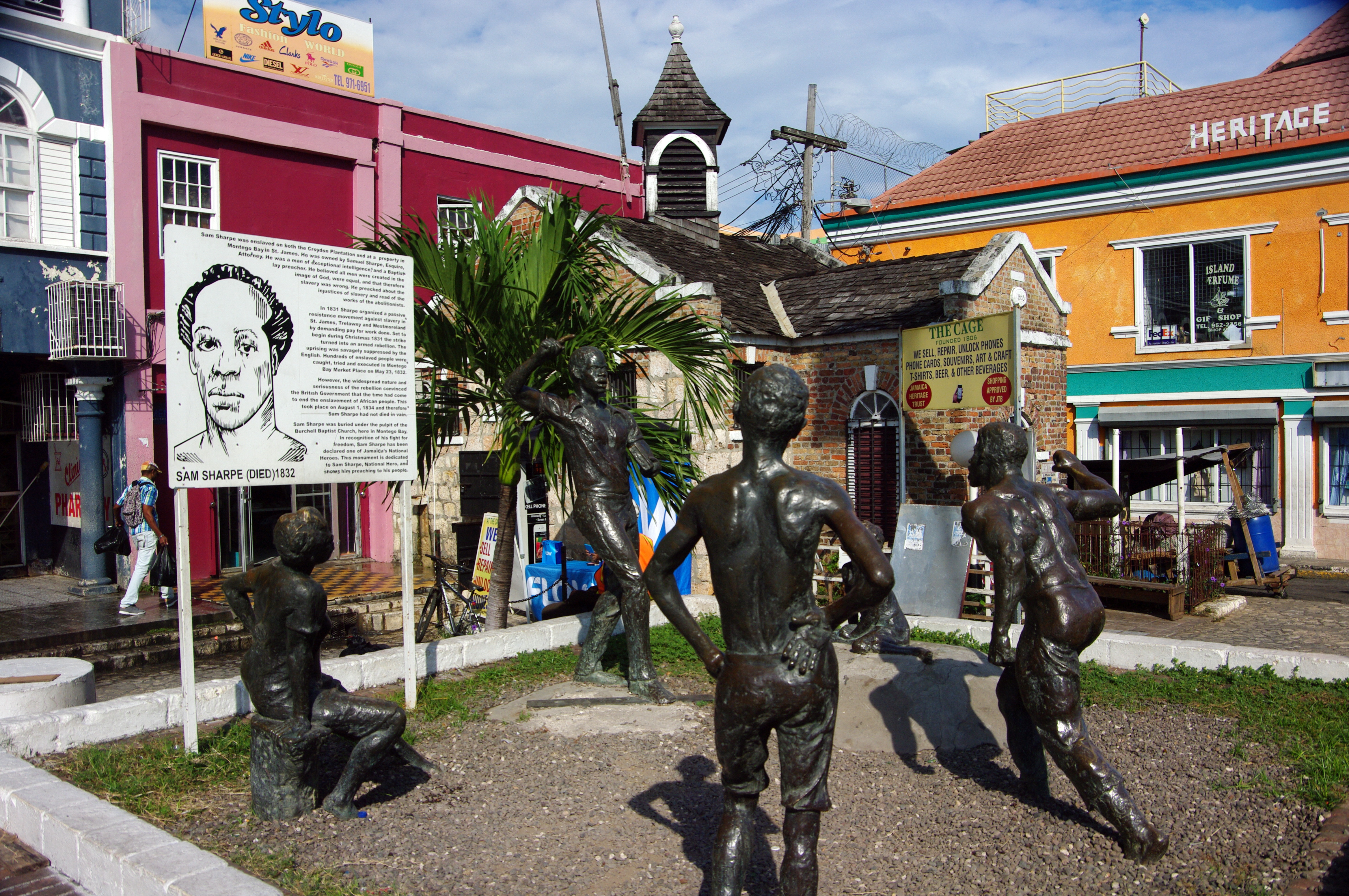 Cage, Montego Bay